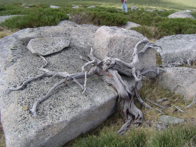 Enebro quemado (Juniperus communis subsp. nana). La Serrota (2294 m) (Ávila), España. Sistema Central